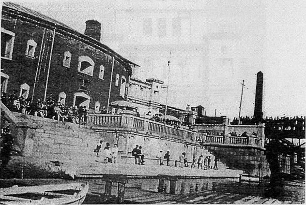 Сапёрная прыстань. Польскі перыяд (1930-я гады).